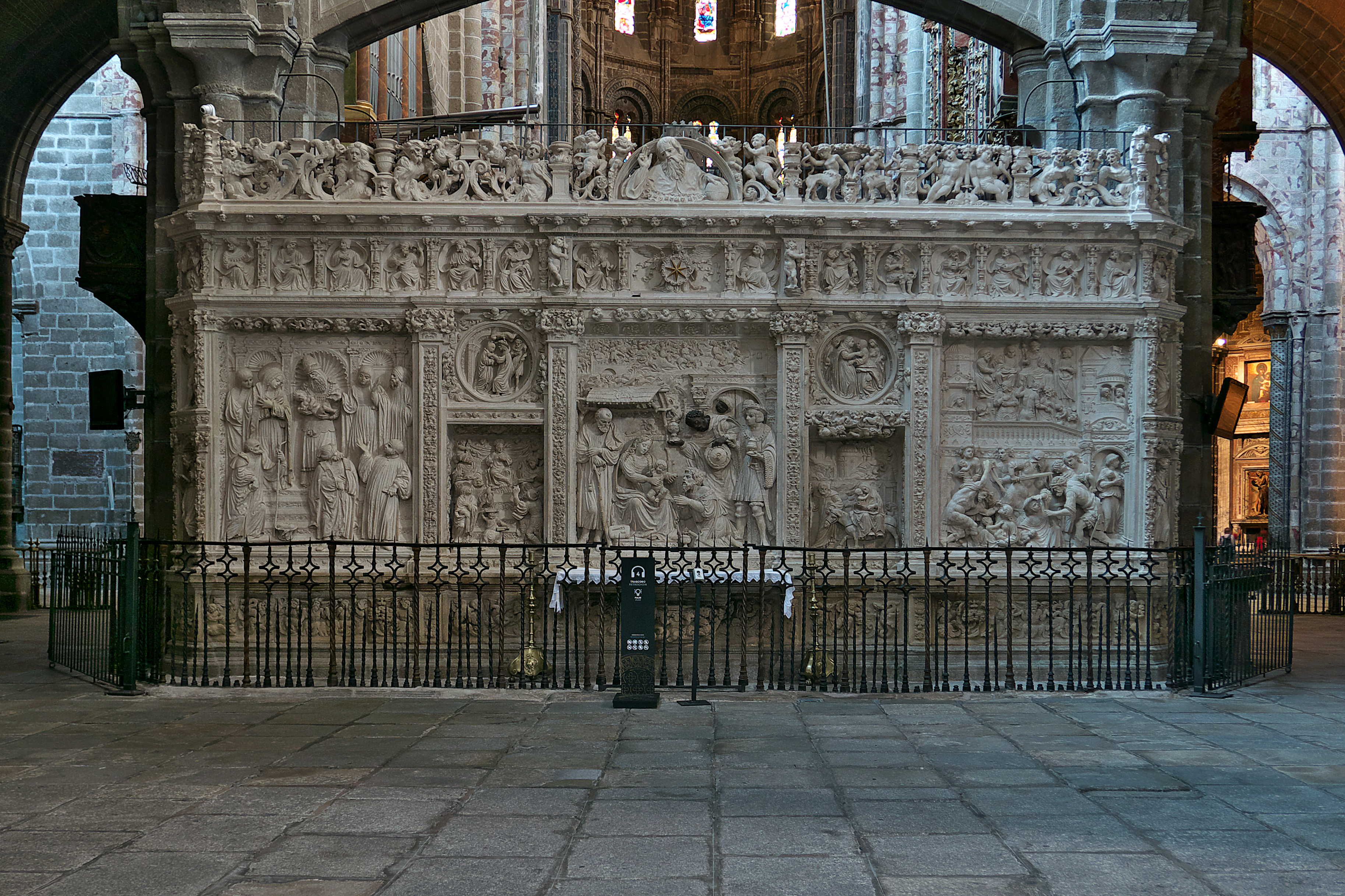 Juan Rodríguez y Lucas Giraldo (1531-1536) desarrollan en piedra caliza, para el trascoro de la Catedral de Ávila, la infancia de Jesús.